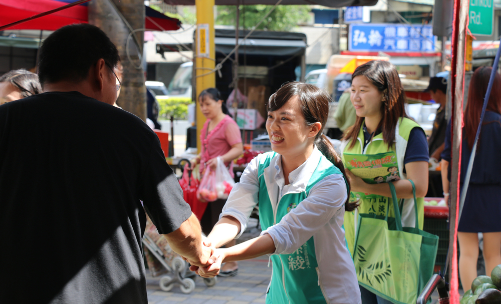 八里、三芝、石門、淡水、泰山、林口立委擬參選人呂孫綾